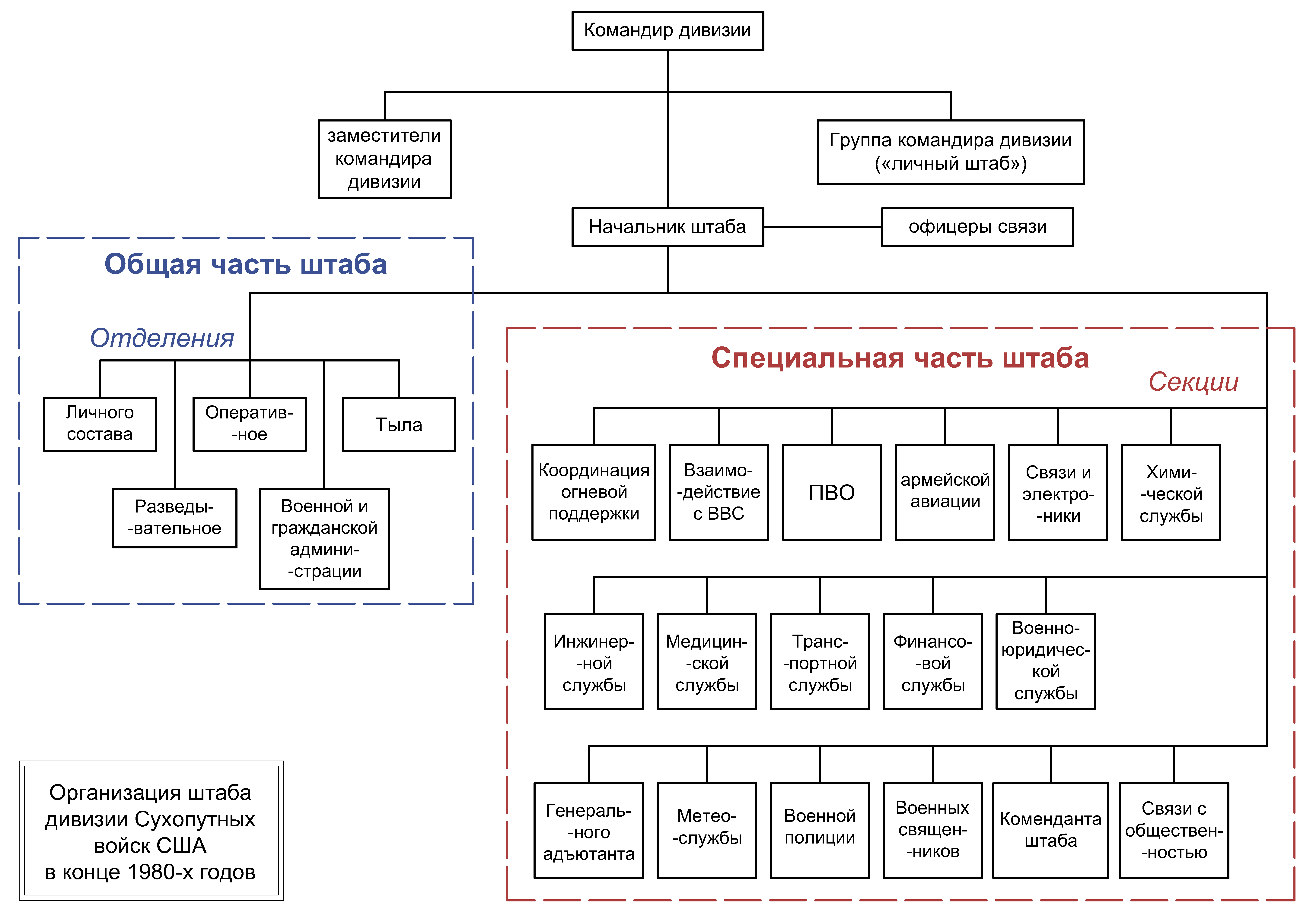 Бородаев В. и Кузвесов А «Организация управления в дивизии Сухопутных войск США». Зарубежное военное обозрение 12.1988